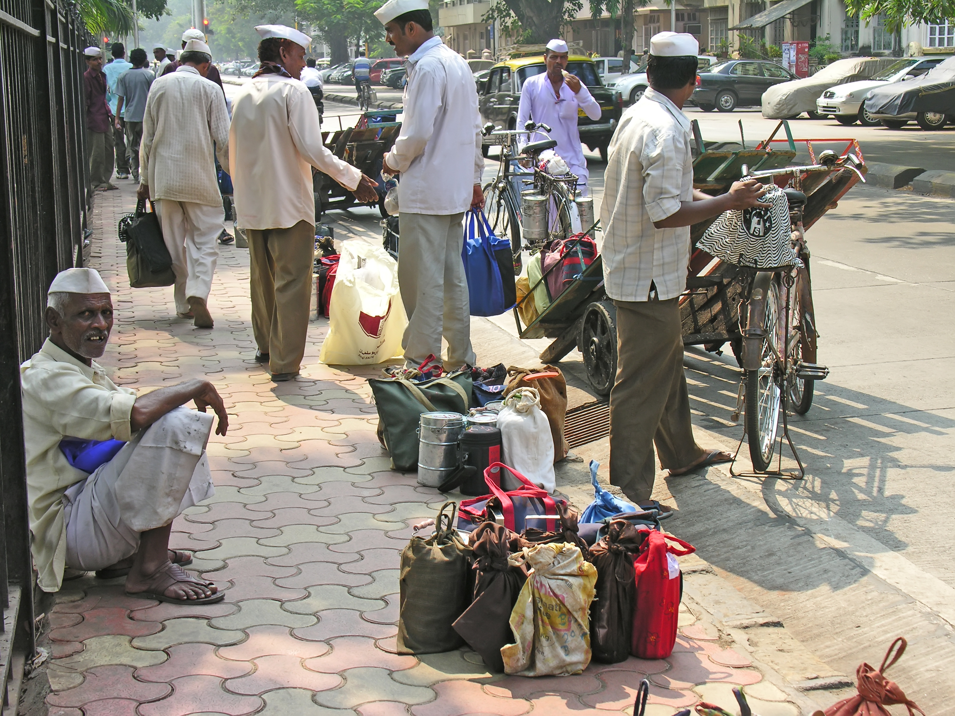 India-7876